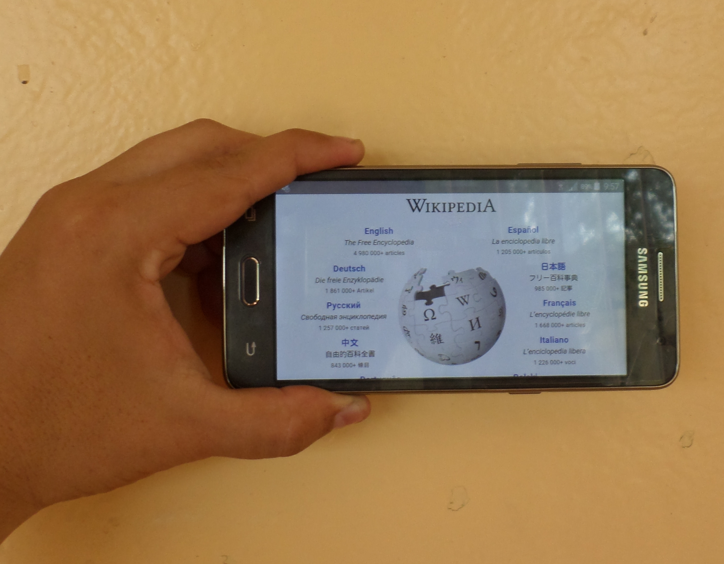 Telefono Samsung galaxy grand prime mostrando Inicio en Wikipedia